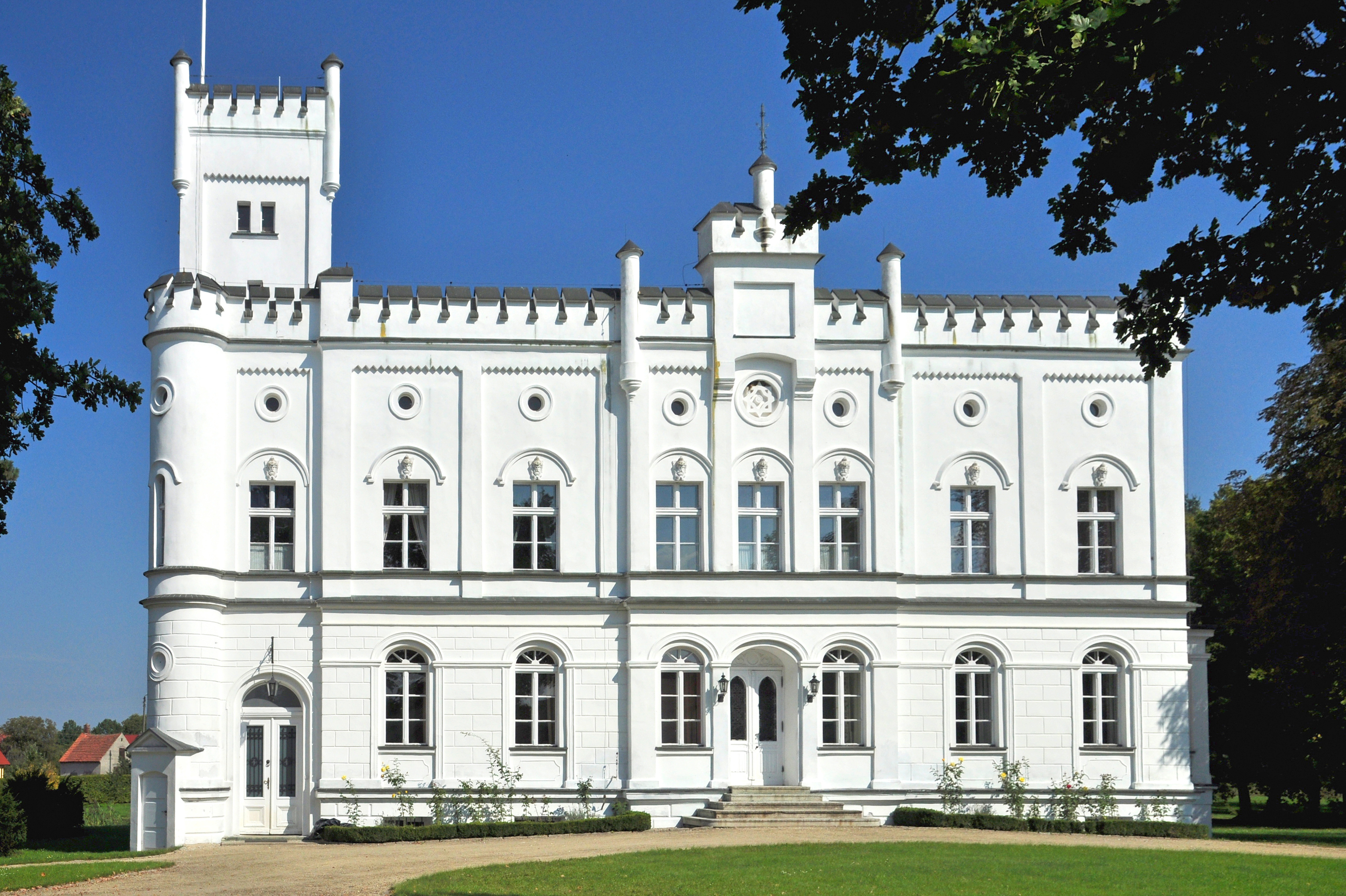 Neogotycki pałac w Prężycach